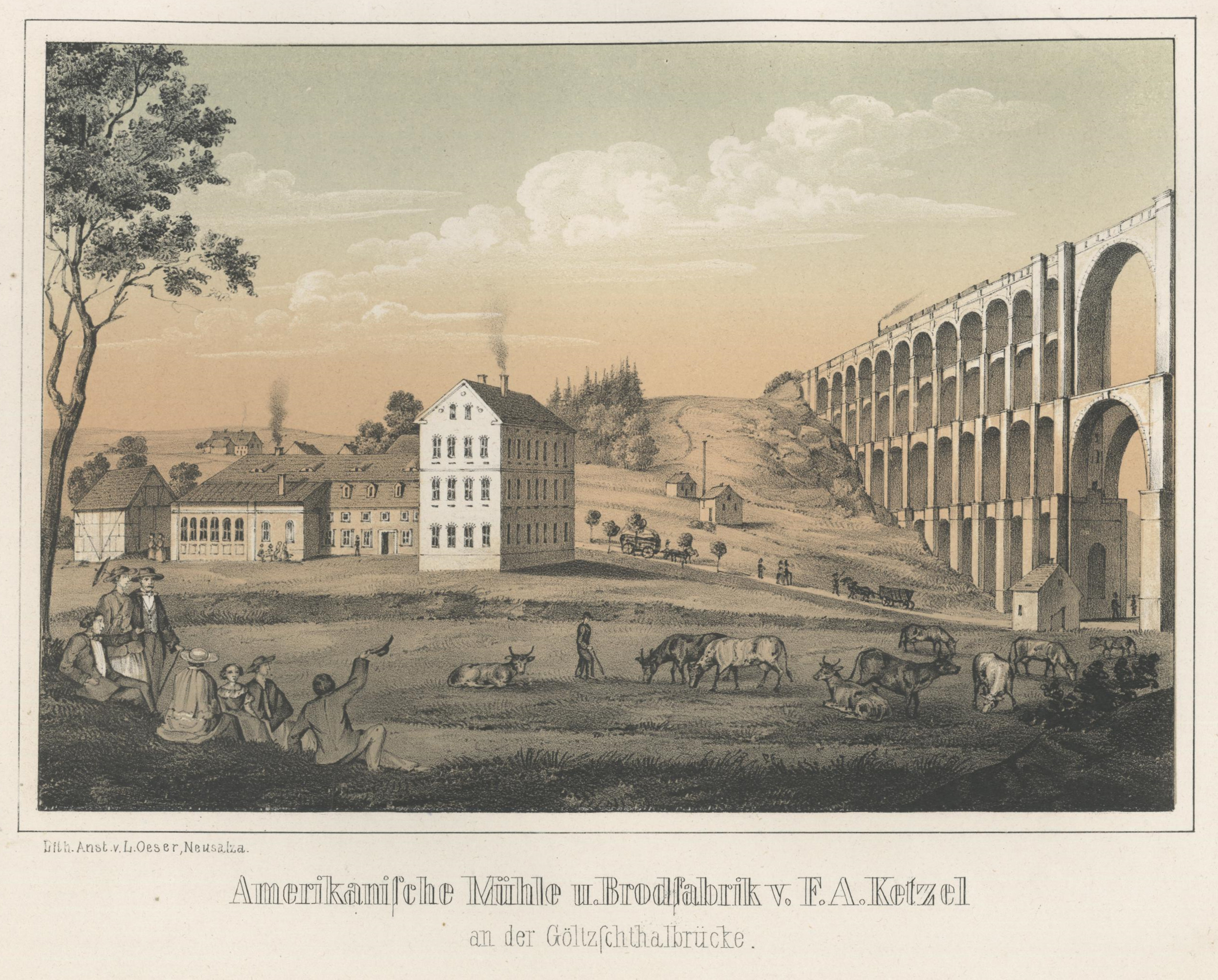 Amerikanische Mühle und Brodfabrik von F. A. Ketzel an der Göltzschthalbrücke aus: Album der Sächsischen Industrie Zweiter Band